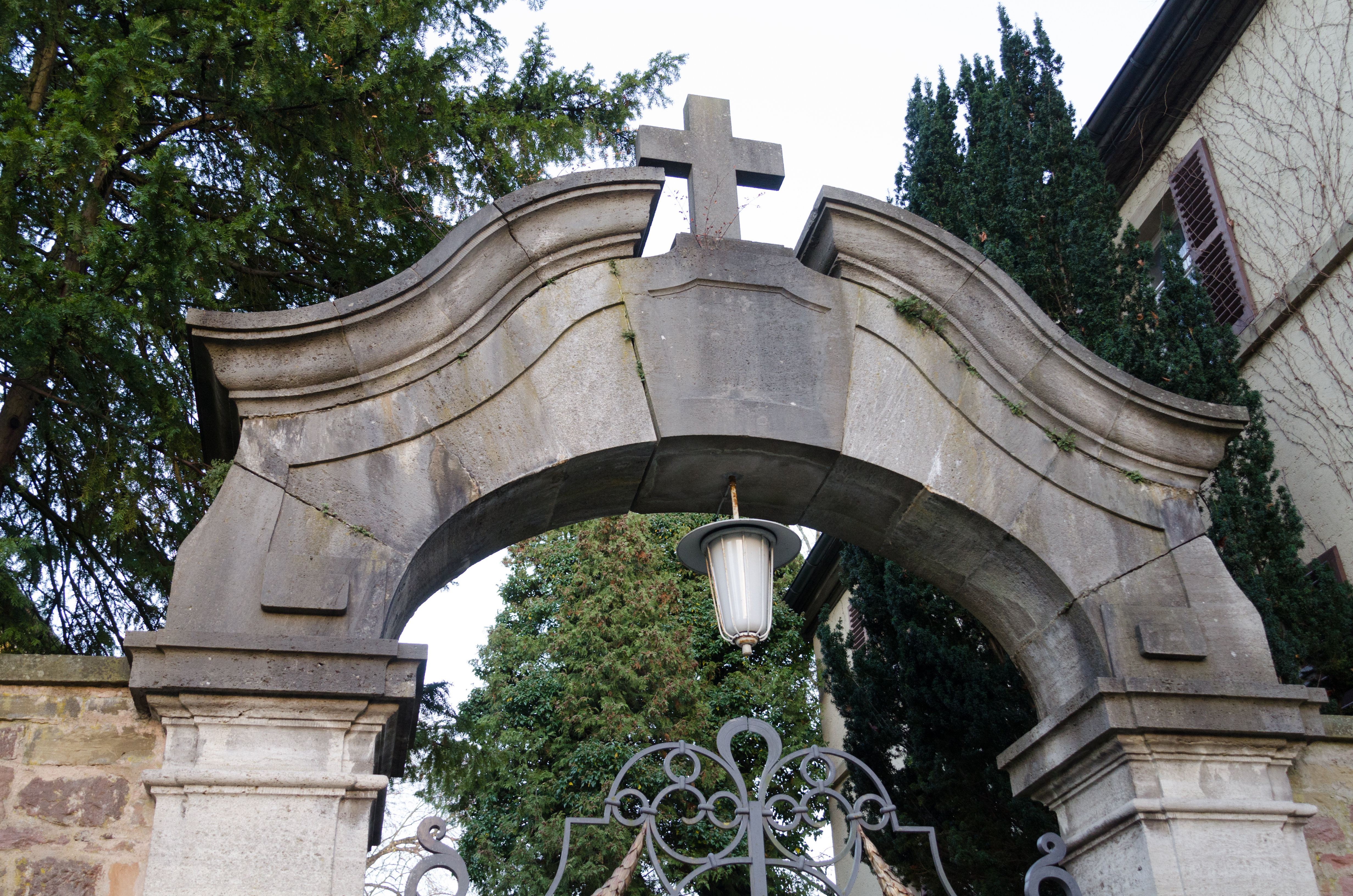 Grabmahle auf dem Kapellenfriedhof in Bad Kissingen